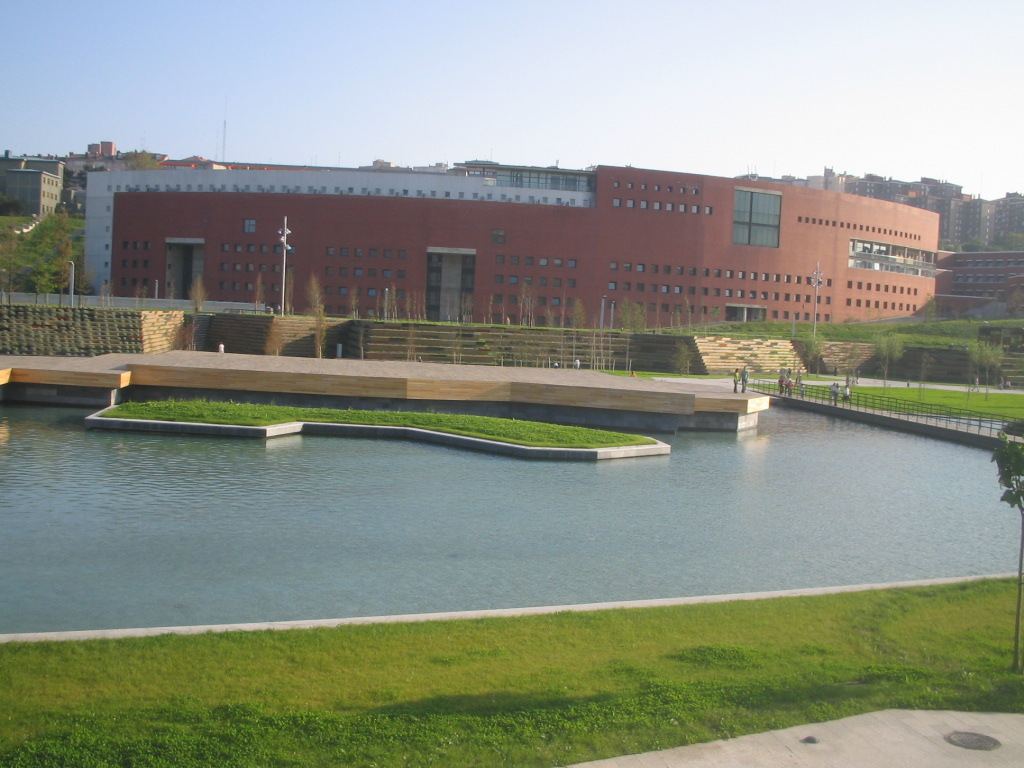 Facultad de Escuela Técnica Superior de Ingenieros Industriales y de Telecomunicaciones (Universidad de Cantabria), desde el Parque de las Llamas de Santander